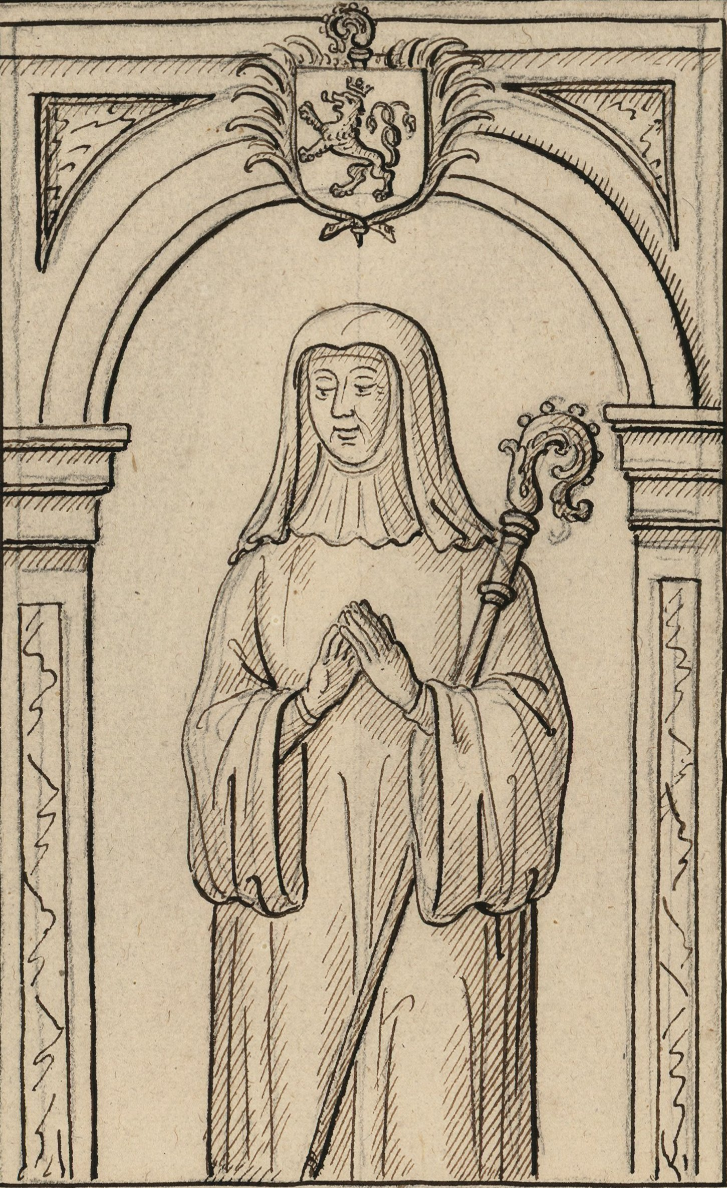 Pierre tombale sur laquelle est gravée l'effigie d'une abbesse